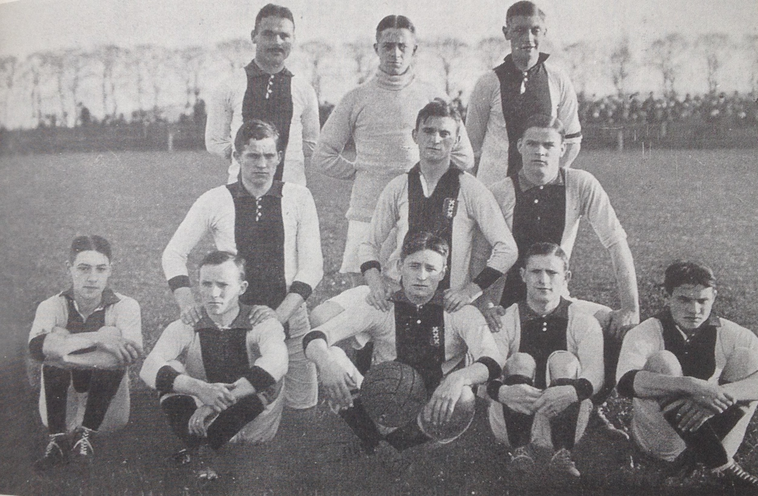 Ajax in het seizoen 1914/1915.Boven: Frans Schoevaart, Gerard Ziegeler, August Dona. Midden: Hendrik Evert Sluijter, Joop Pelser, Frits Terwee.Onder: Gé Bosch, Jan-Willem Lucas, Theo Brokmann, Rinus Lucas, Andre Maasen.